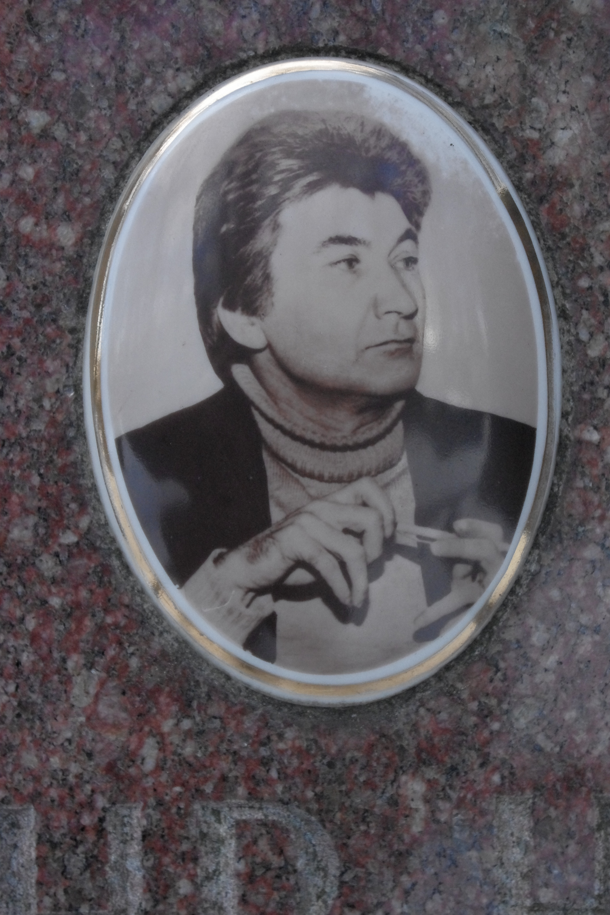 Grób krytyka filmowego Aleksandra Halka-Ledóchowskiego (1933-1991) na Cmentarzu Powązkowskim w Warszawie